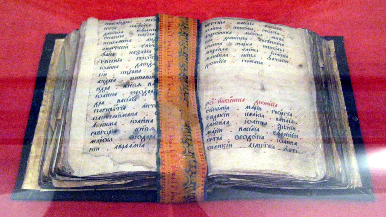 Синодик Ферапонтова монастыря. Запись рода иконника Дионисия, 17 век